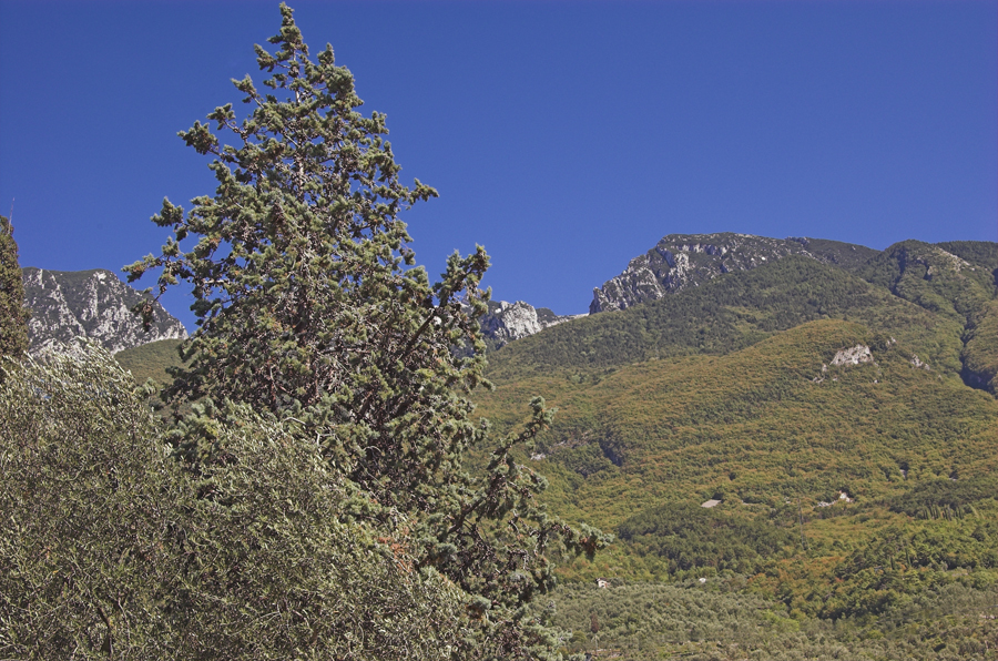 Il monte Baldo visto dal lago i Garda